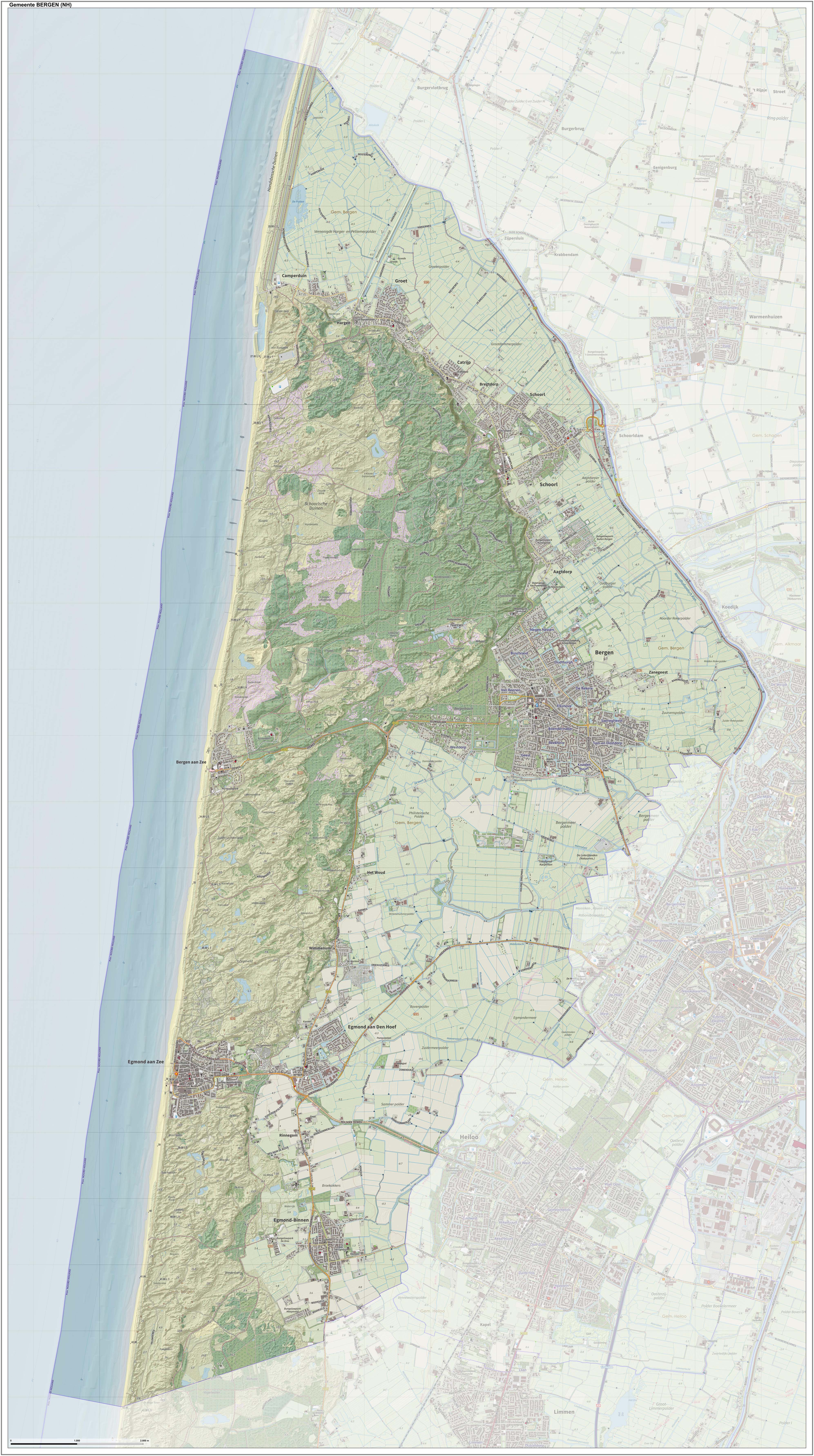 Topografische gemeentekaart. Resolutie: 400 pixels/km. Kaartbeeld samengesteld uit de open geodata van de Top10NL en Top25namen (Kadaster), Creative Commons-BY licentie. Gebouwvlakken uit open geodata BAG extract. Wegen uit de OpenStreetMap, OpenStreetMap community. Reliëfschaduw uit de Actuele Hoogtekaart AHN2. Samenstelling en kleurenschema: Jan-Willem van Aalst, met QGIS. Zie ook de Legenda.